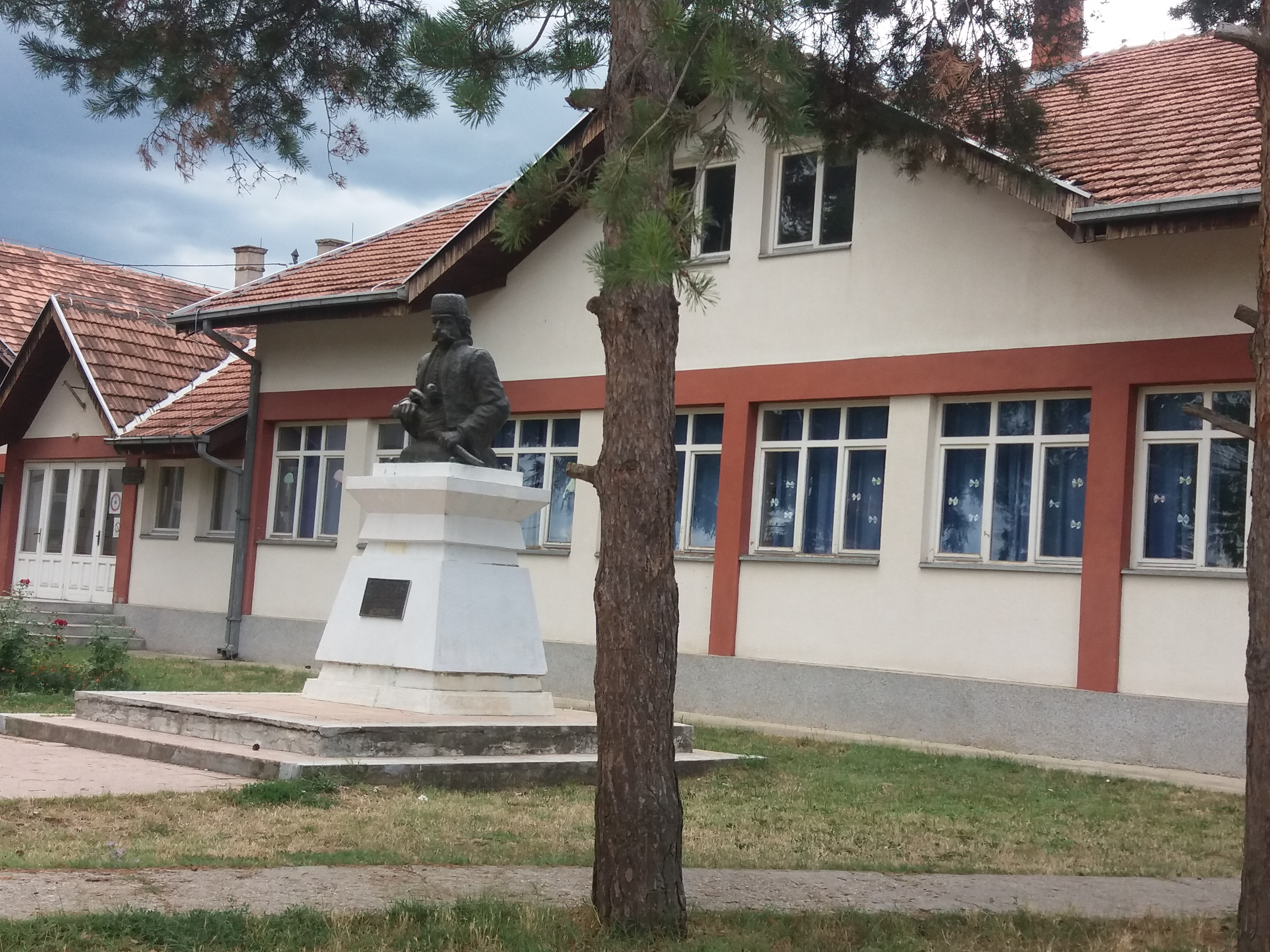 Osnovna škola Stanoje Glavaš, Glibovac